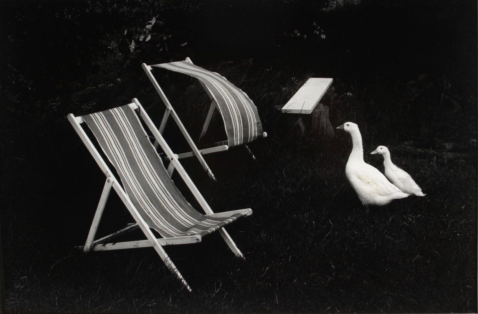 Couple de canards blancs face à une paire de chaises longues dans un jardin.